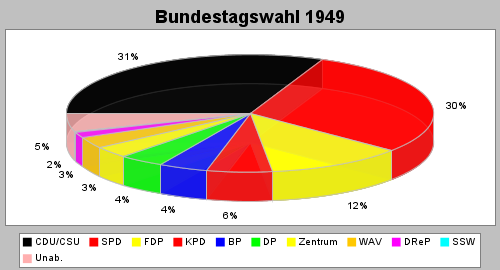 Ergebnisse Bundestagswahl 1949